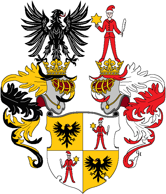 Wappen der aus Tirol stammenden und 1734 durch Kaiser Karl VI. in den Reichs- und erbländisch-österreichischen Ritterstand mit dem Prädikat "von Schullern zu Schrattenhofen" erhobenen Familie Schueller. Zeichnung von Gerd Hruška ( Für weitere Informationen zu dieser Standeserhebung siehe (